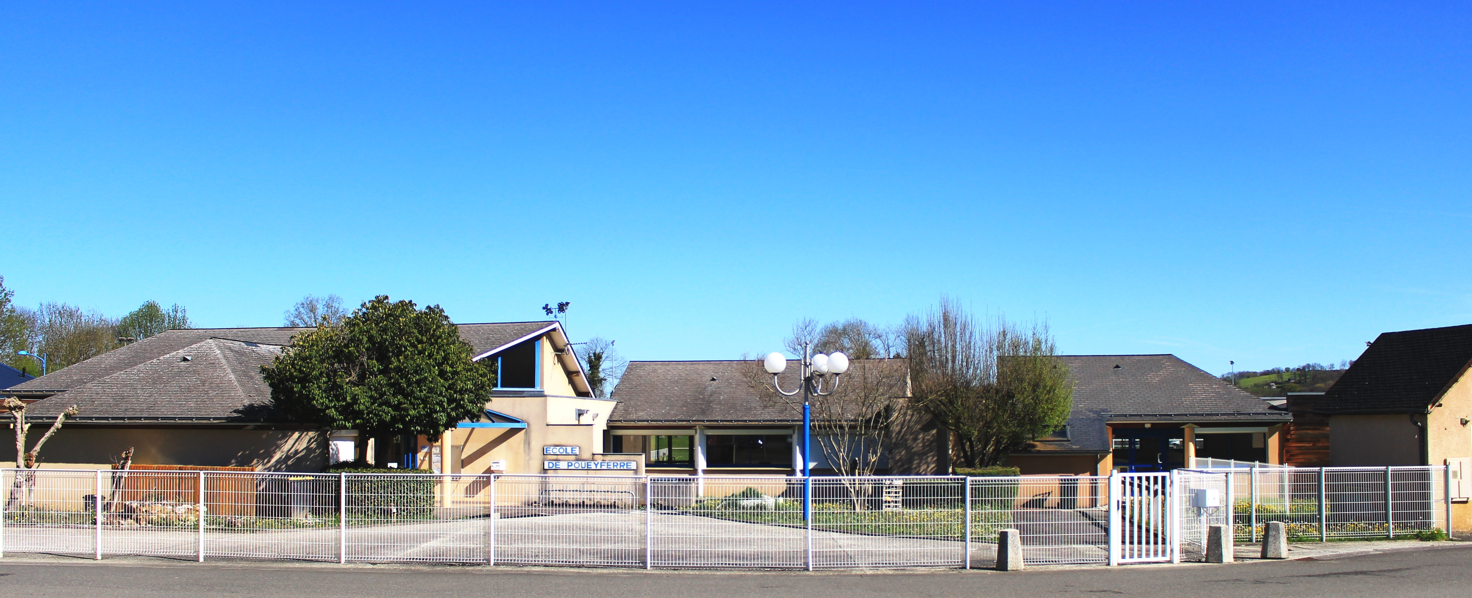 École de Poueyferré (Hautes-Pyrénées)